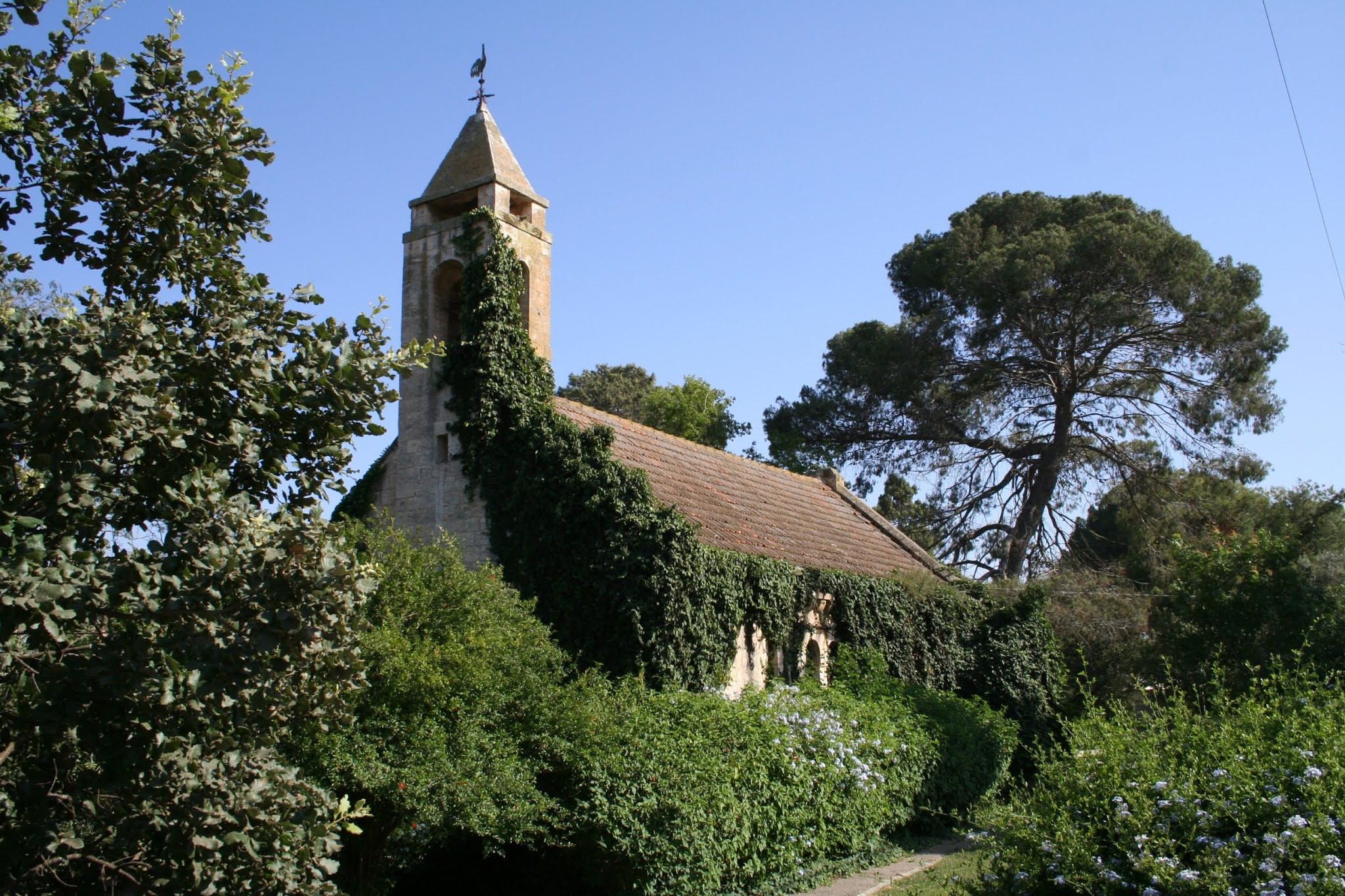 כנסייה אוונגלית במרכז אלוני אבא, שהוקמה בשנת 1916, לאחר שחלק מהטמפלרים שבו אל חיק הכנסייה הלותרנית. מבנה הכנסייה בסגנון נאו-גותי, והאבנים להקמתו נחצבו בנחל ציפורי. המבנה שימש כבית תרבות מ-1948 עד 1971 ולאחר מכן נזנח.